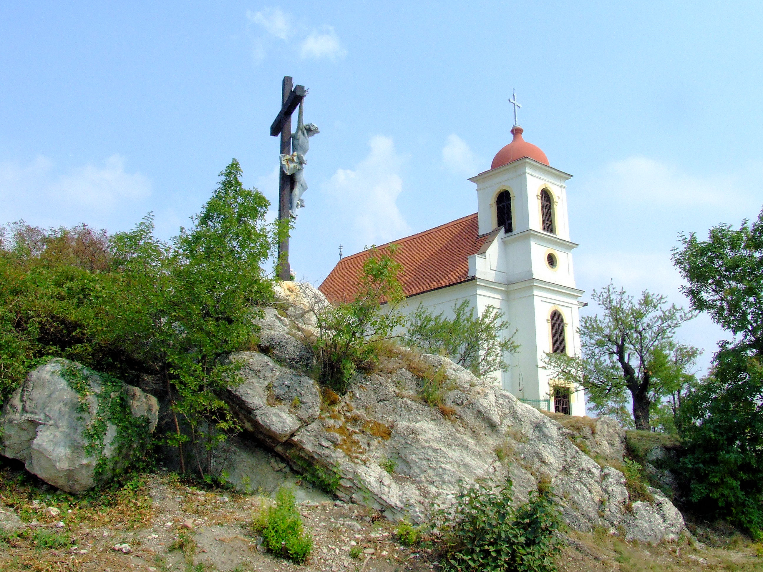 A tettyei Havihegyi kápolna és Havihegyi kereszt. A kápolnát 1709-1710-ben építették barokk stílusban, az 1691-es pestisjárvány emlékére. A kereszt Kiss György szobrászművész alkotása